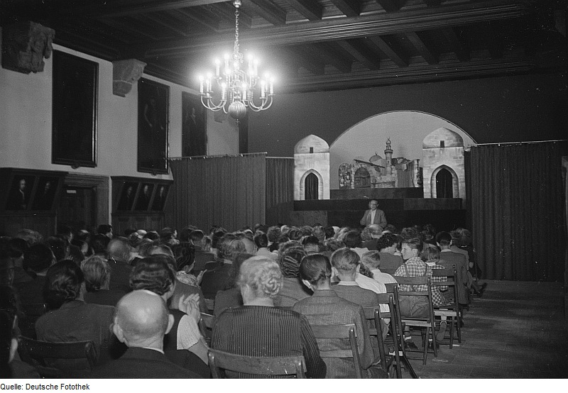 Original image description from the Deutsche FotothekBlick über die Zuschauer auf die Bühne mit dem Puppenspieler Paul Hölzig bei einer Aufführung einer Hodsha Nasreddin-Geschichte